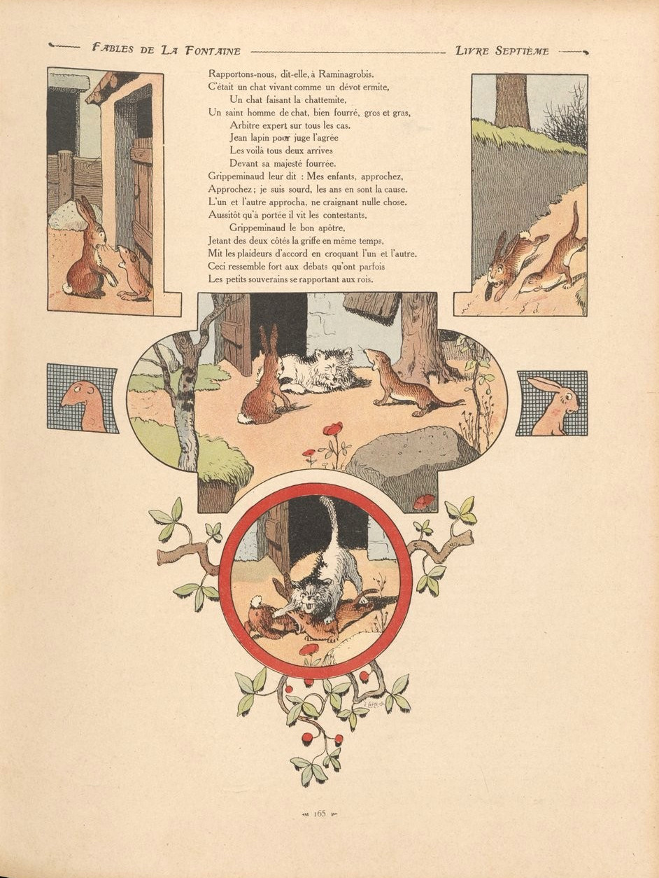 Fables de La Fontaine illustrées par Benjamin Rabier : Le chat, la belette et le petit lapin.